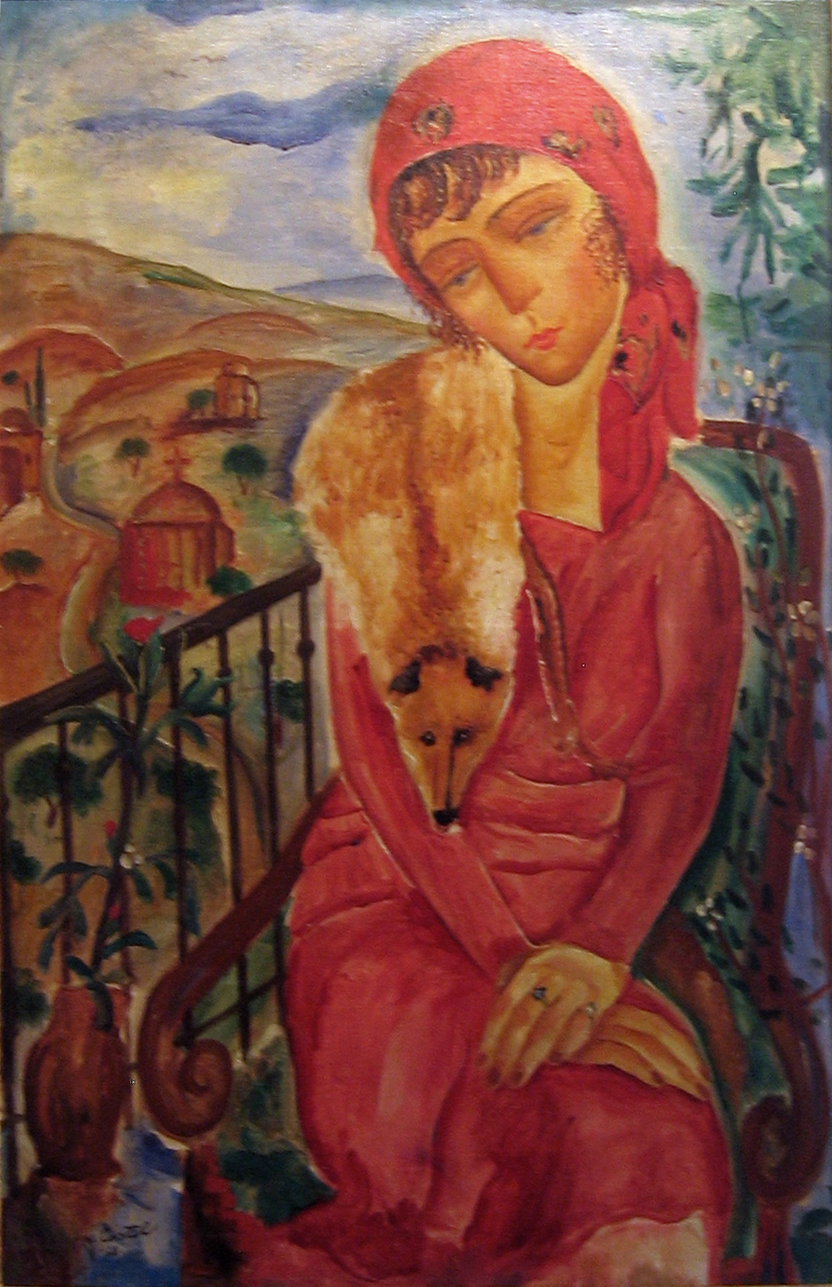 Painting